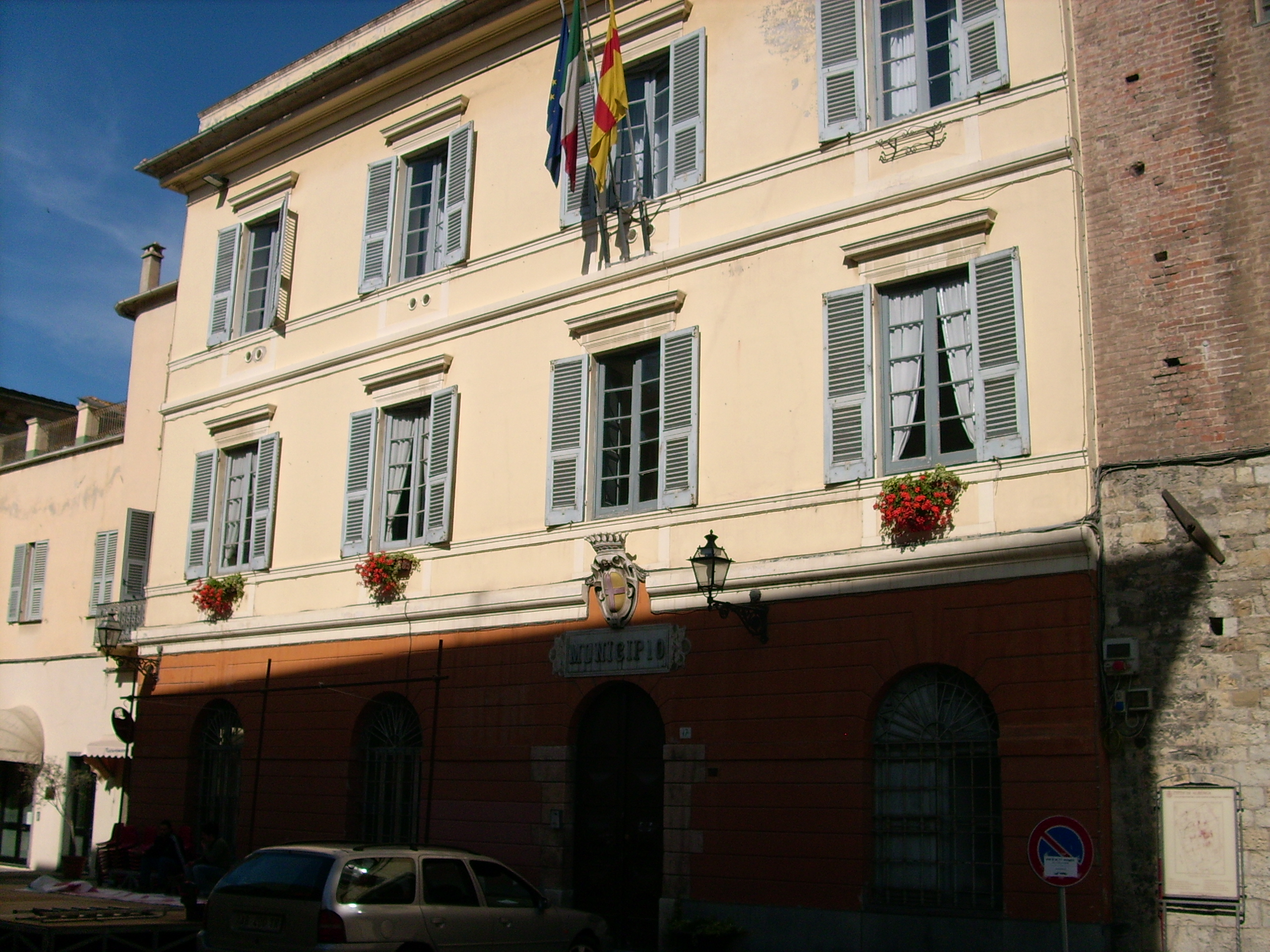 Palazzo Municipale di Albenga, Liguria, Italia